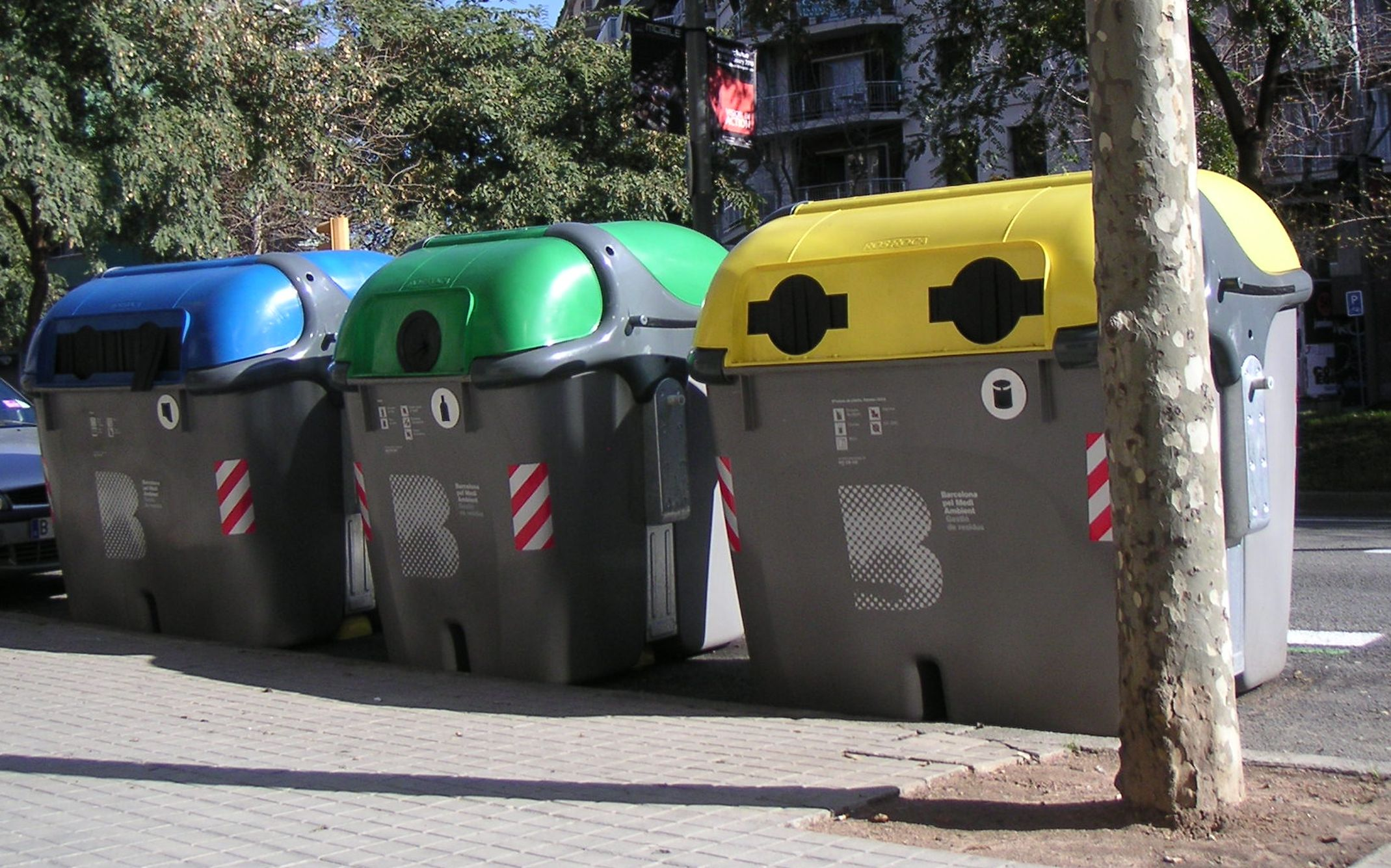 Contenidors per a recollida selectiva a Barcelona. El blau és per a paper, el verd per a vidre (a Barcelona no es separa el vidre per colors) i el groc és per a plàstic.